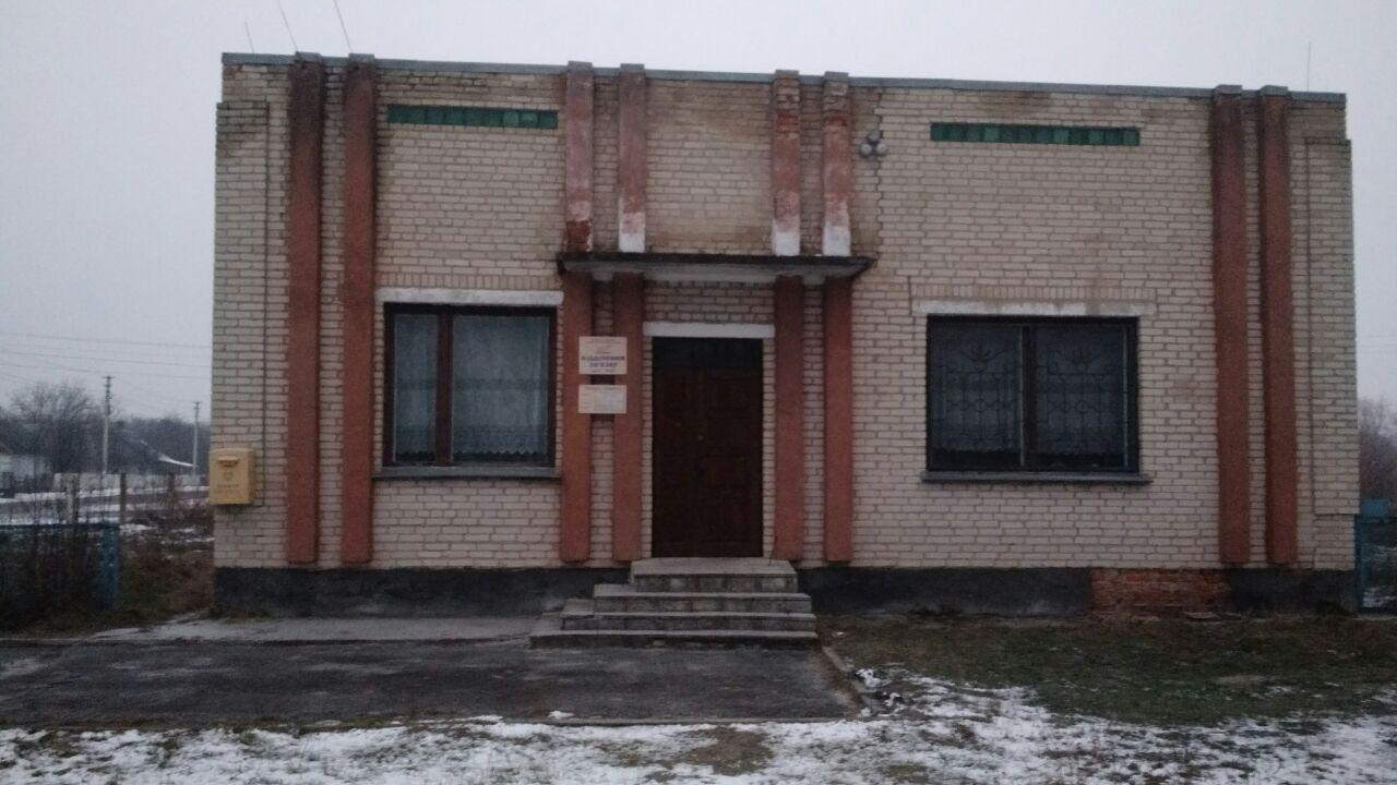 Будівля відділення Укрпошти в с. Озеро (Ківерцівський район)